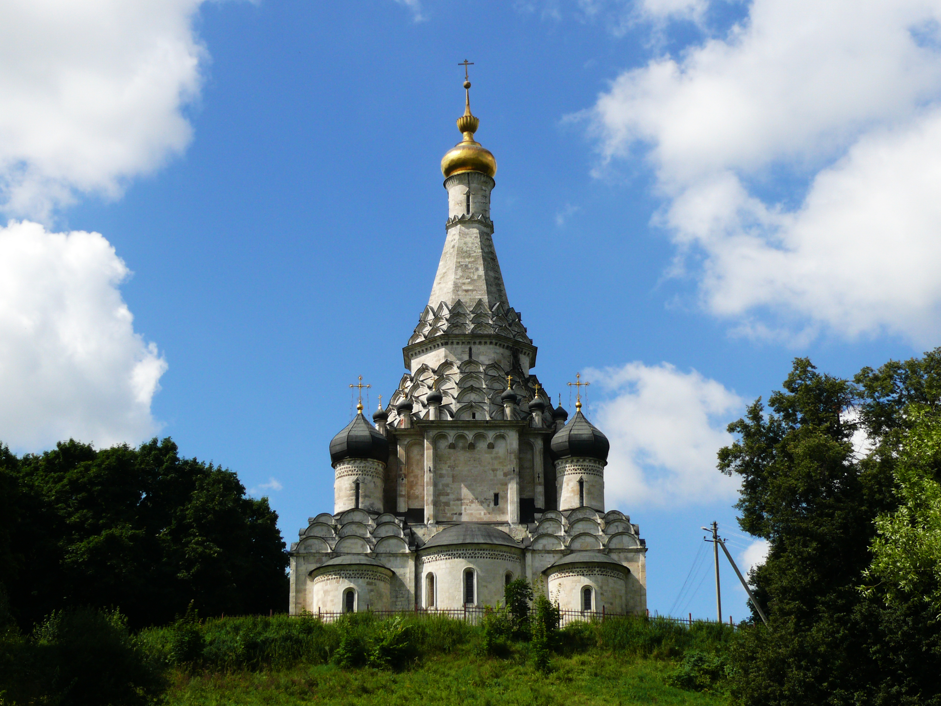 Церковь Преображения Господня: Остров, Ленинский район, Московская область